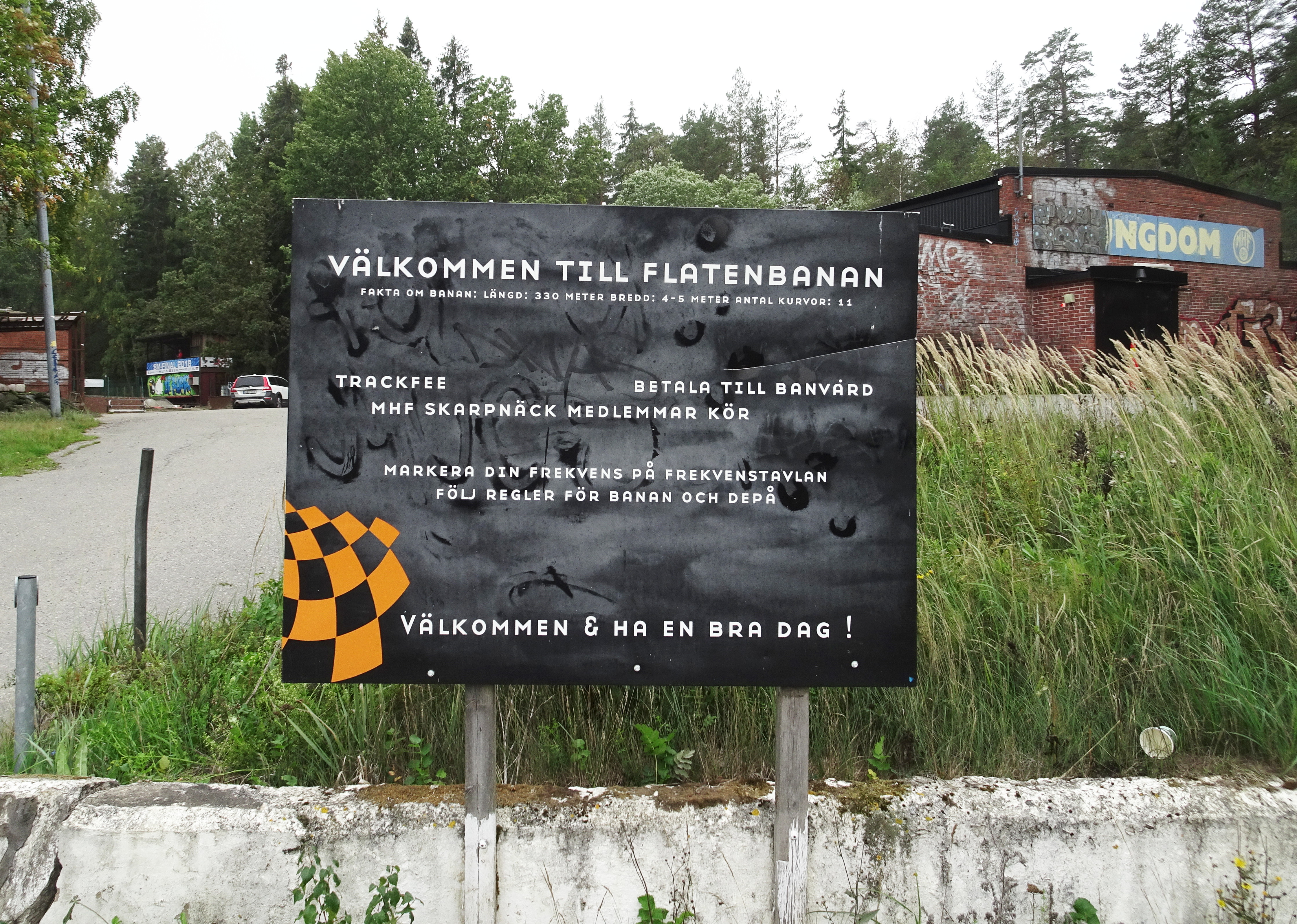 Flatenbanan